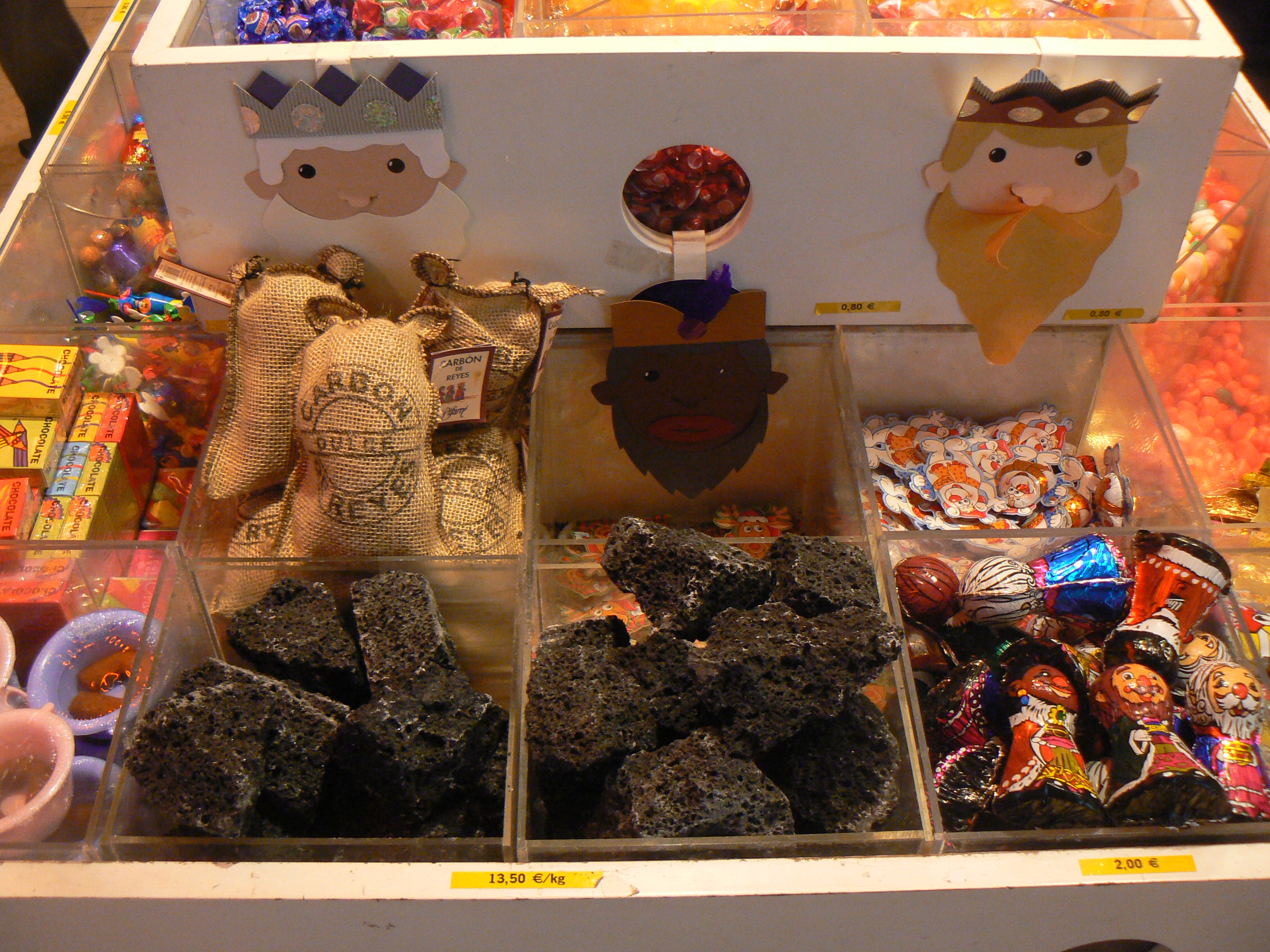 El carbó de nadal està fet bàsicament amb sucre. Les figures de xocolata són llaminadures que sol cagar el tió o que poden portar els reis. Algunes de les més tradicionals als Països Catalans són precisament els Reis Mags, ampolles de cava, paraigües, monedes, caixetes de llapissos de colors (fa anys havien estat de cigarretes de xocolata, avui prohibits), etc.